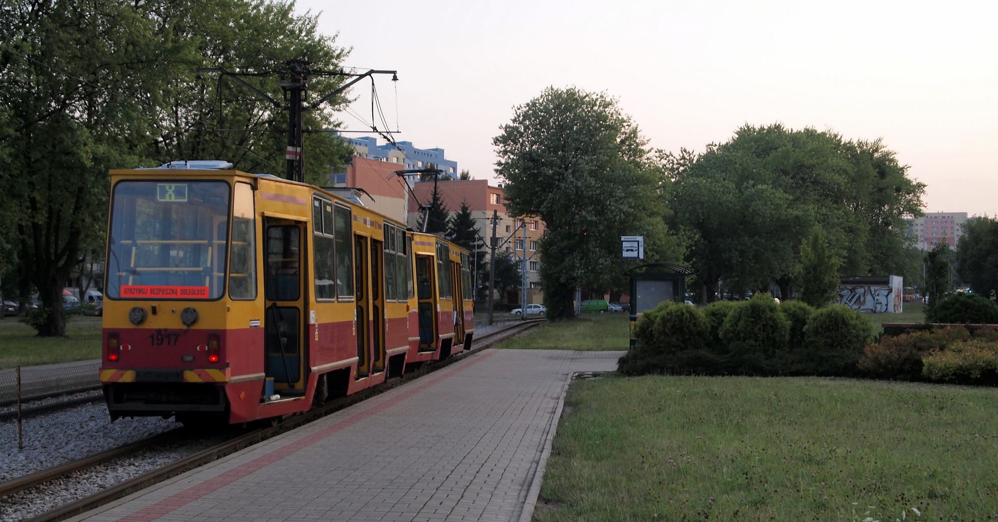 Jedna z ostatnich "ósemek" jadąca na pętlę Wyszyńskiego. Dziś objazdem, kiedyś tutaj '8' miała tutaj swoją właściwą trasę.